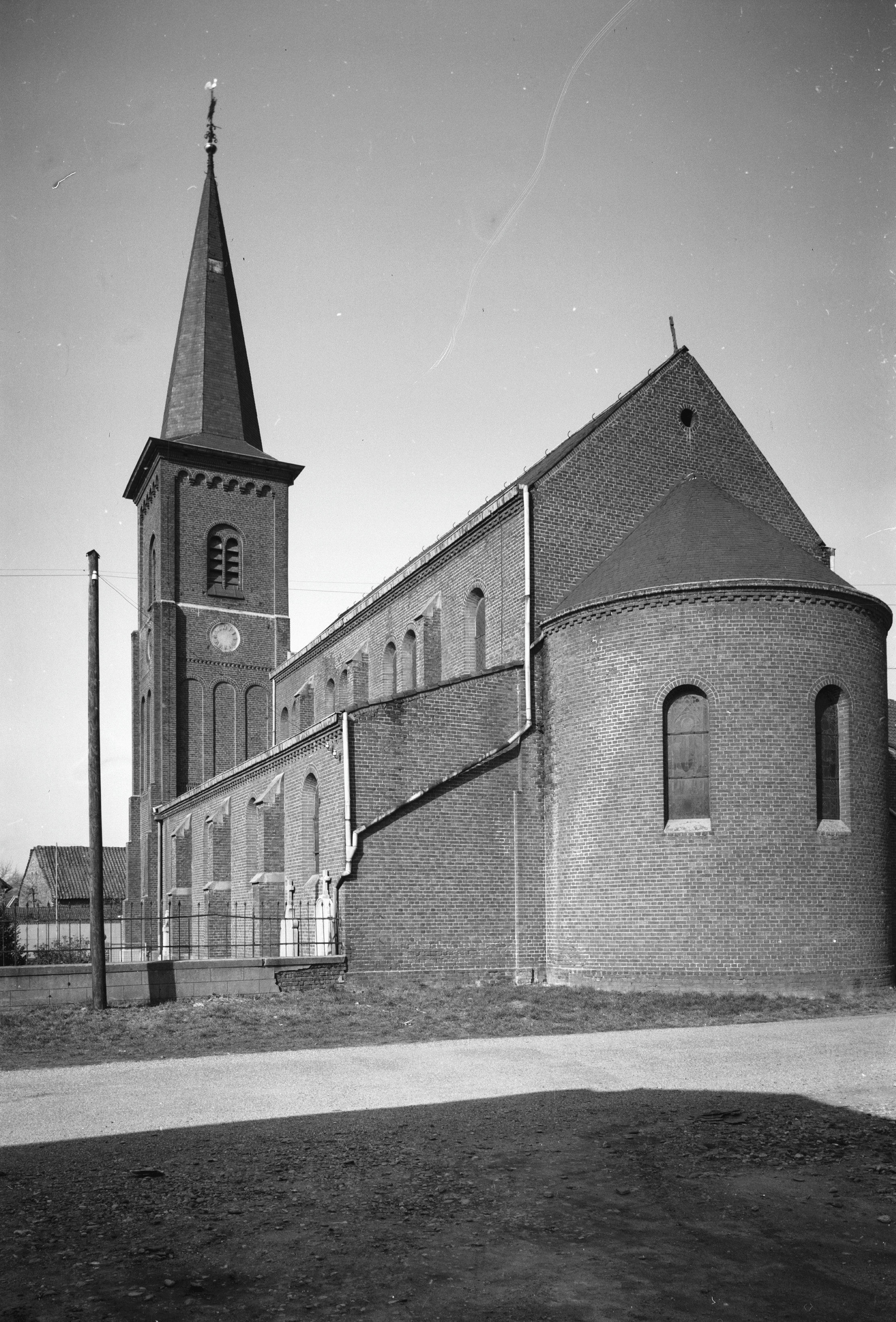 Voormalige Rooms-Katholieke Kerk: aanzicht